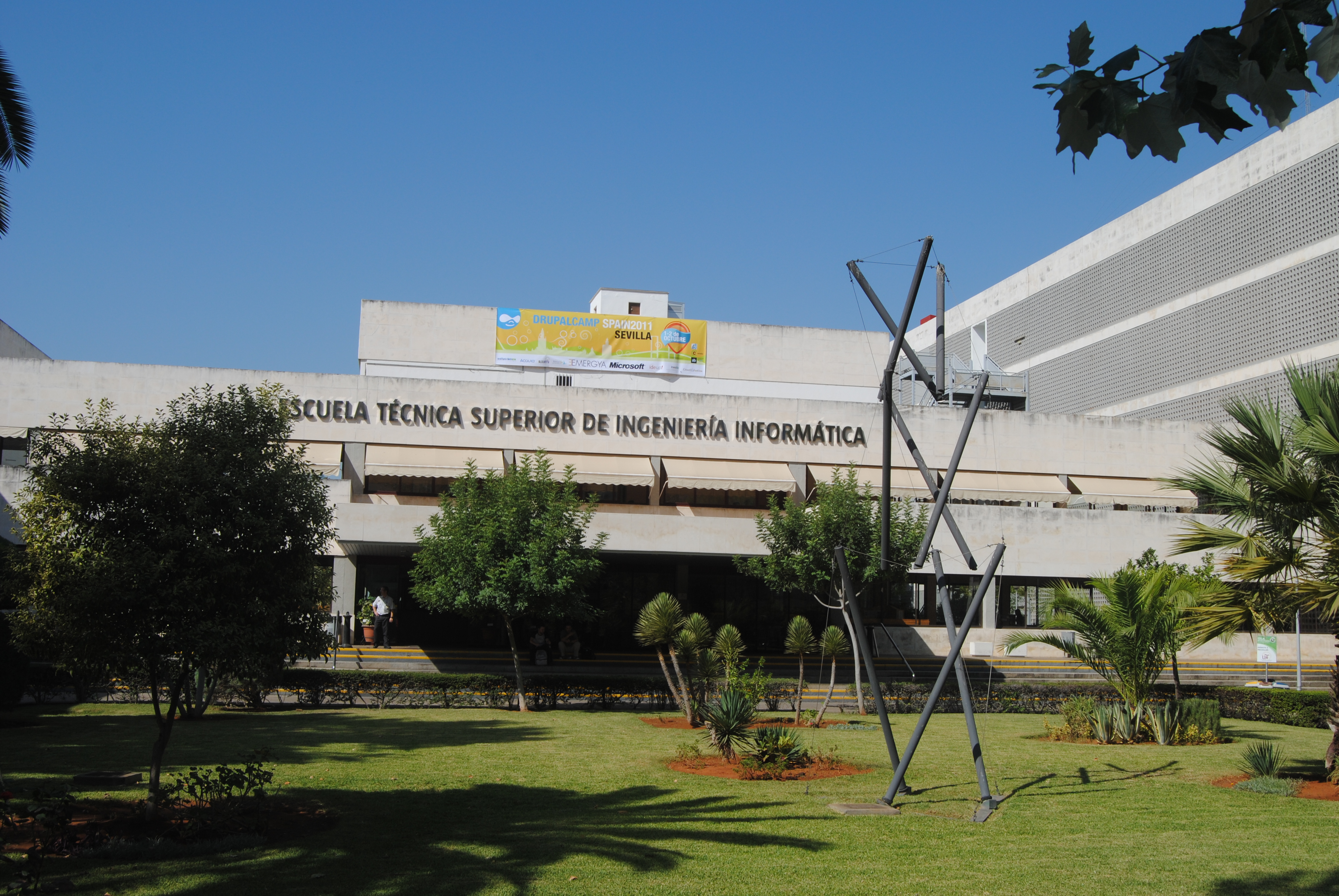 ETSIInformatica de Sevilla. Drupalcamp SPAIN 2011